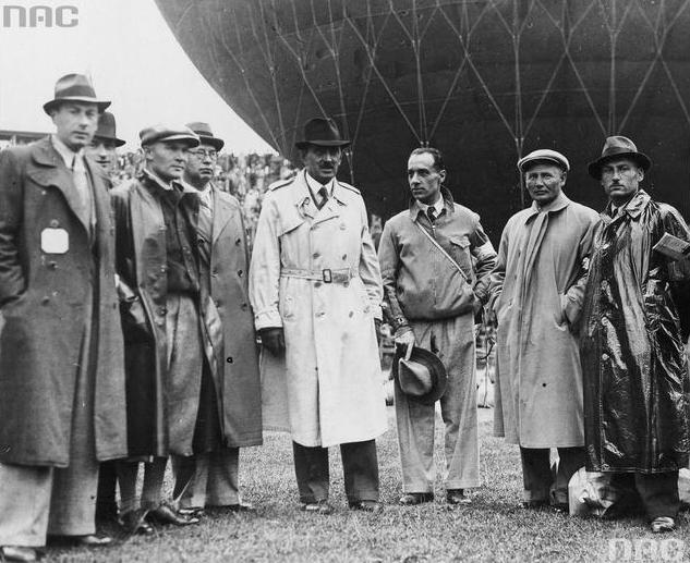 Międzynarodowe Zawody Balonowe o Puchar Gordona Bennetta w Brukseli w 1937. Polscy piloci balonowi: inżynier Franciszek Janik, kapitan Franciszek Hynek, kapitan Zbigniew Burzyński, pułkownik Jan Wolszlegier, pułkownik Julian Sielewicz, porucznik Wacław Koblański.